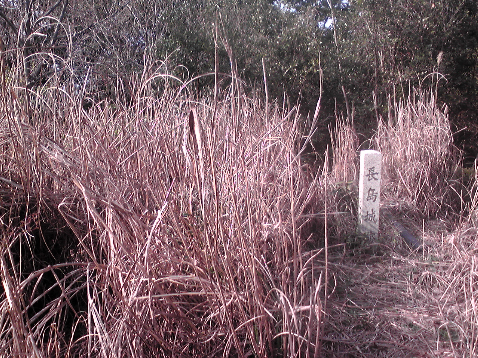 長島城（紀伊国）の本丸跡地にある石碑